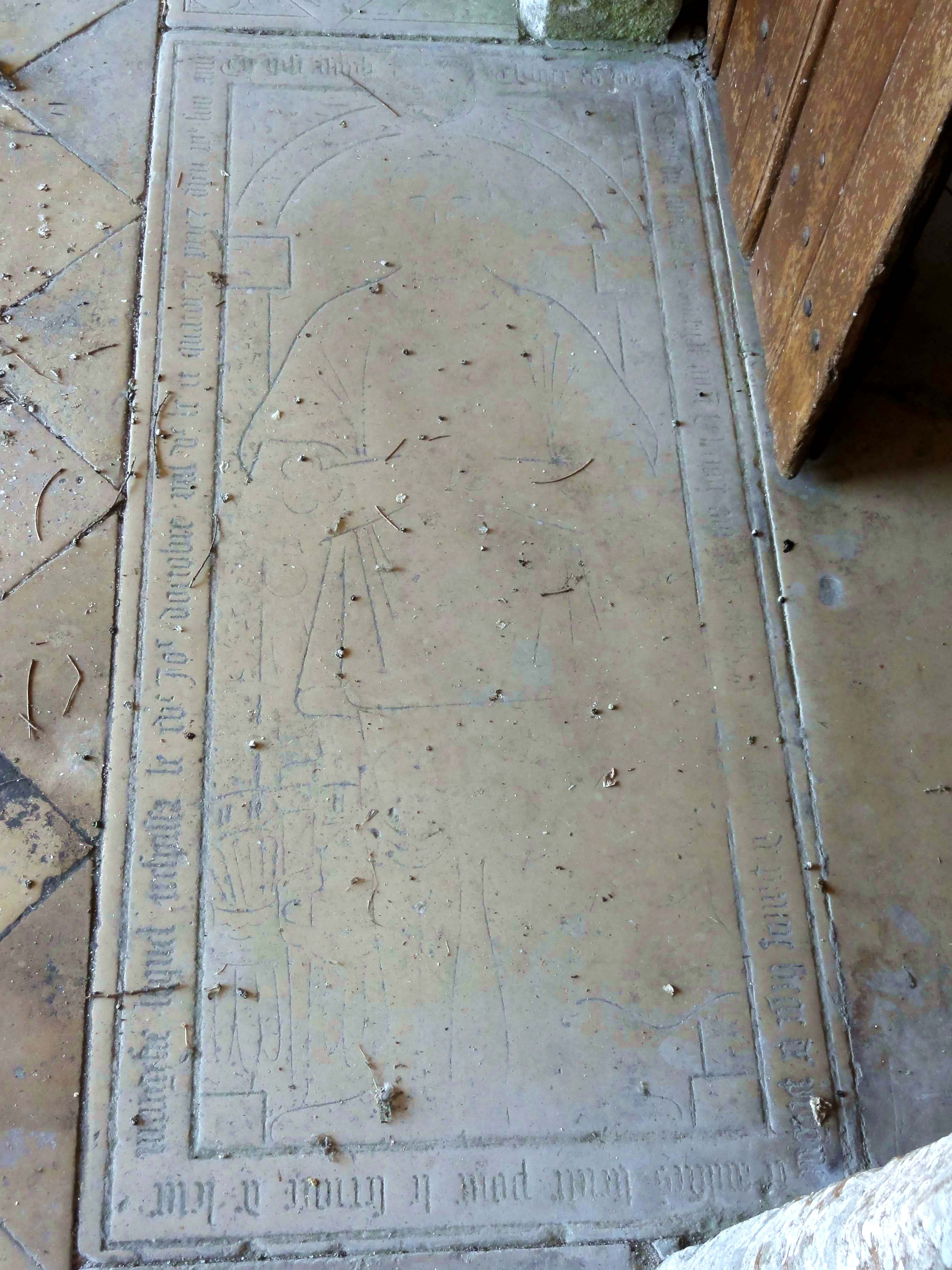 Mobilier de l'église (voir titre).